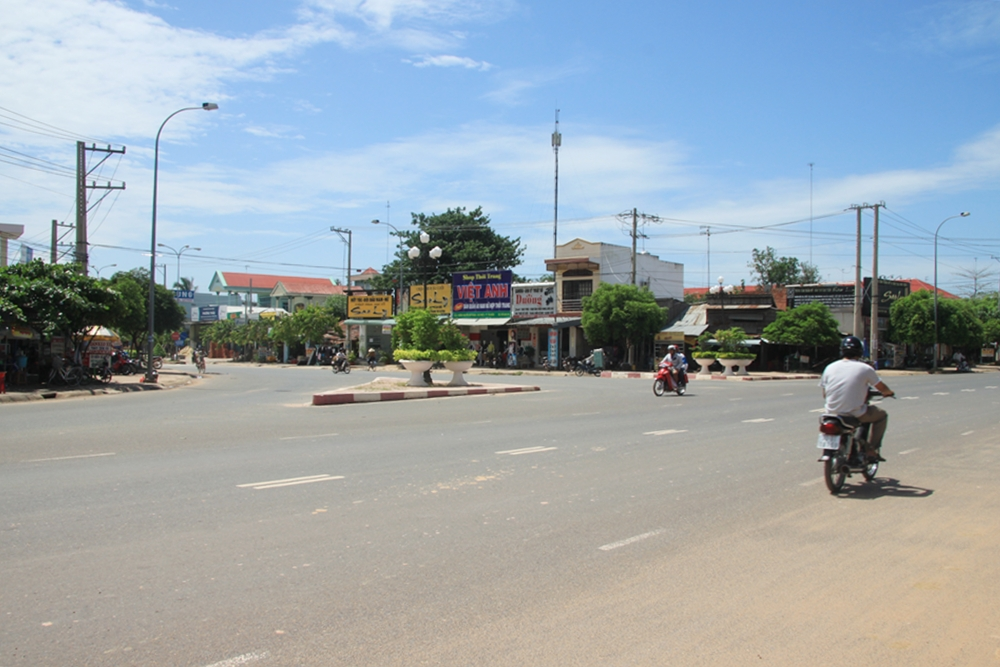 Ngã ba Cần Đăng, tại Thị trấn Tân Biên, Tây Ninh